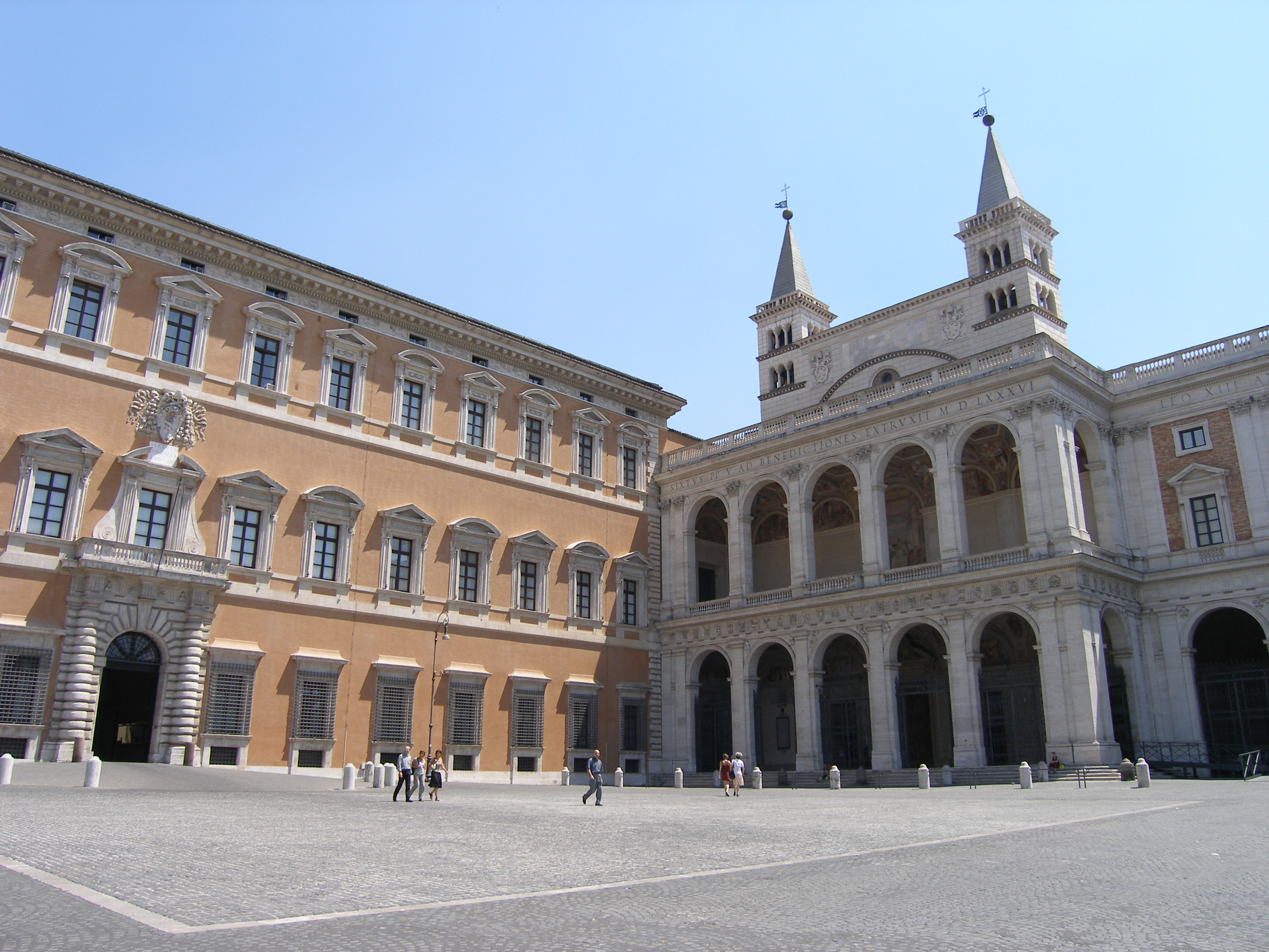 San Giovanni in Laterano - Seitenansicht